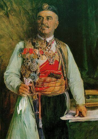 Ritratto in piedi di Nicola I del Montenegro - dipinto a olio del 1910/1912 Nota: Questo dipinto di autore ignoto e di ignota collocazione potrebbe essere, per stile e partitura cromatica, il quadro recensito da L'Illustrazione di Bologna del 30 giugno 1913, definito bellissimo, opera del pittore Antonio Mosca eseguita nel 1912-1913 per il Comitato pro-feriti montenegrini delle Guerre balcaniche, opera di cui si sono perse le tracce. La maggior parte dei ritratti dipinti di Nicola I del Montenegro sono ricavati da fotografie ufficiali come è il caso di questo dipinto. Sarebbe opportuno avere più notizie circa questo quadro.